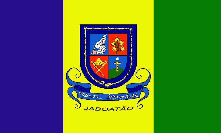 A Bandeira do I.H.J é um retângulo tricolor auricerúleo esmeraldino cujo tamanho é igual a 1 ½ vez de largura, formado por três verticais equivalentes em largura e tamanho, da esquerda para direita - blau - jalne - sinople - partindo da bainha. São as cores filhas das nacionais, de autoria do sócio correspondente AMARO MATIAS SILVA, de Caruaru. Encarregado de traçar seu perfil e simbolismo. Ao centro, na lista áurea, está o escudo ornado adotado com o brasão d’armas, da entidade, autoria do sócio correspondente LUIZ G. CORRÊA, Goiana-PE, aprovado e já em uso desde 1978. Simbolismo (in Heráldica) das cores da bandeira a listra de blau (azul) simboliza a lealdade e formosura dos habitantes da terra; a de jalne (ouro)- a nobreza e majestade dos nobres filhos que lutam pela Pátria nascente, fazendo a História e a nobreza brasileira; a de sinople (verde) a fé e o respeito aos postulados de nossos ancestrais cristãos honrados e a esperança de melhores dias na pesquisa e divulgação dos feitos heroicos. Agosto de 1983. Amaro Matias Silva